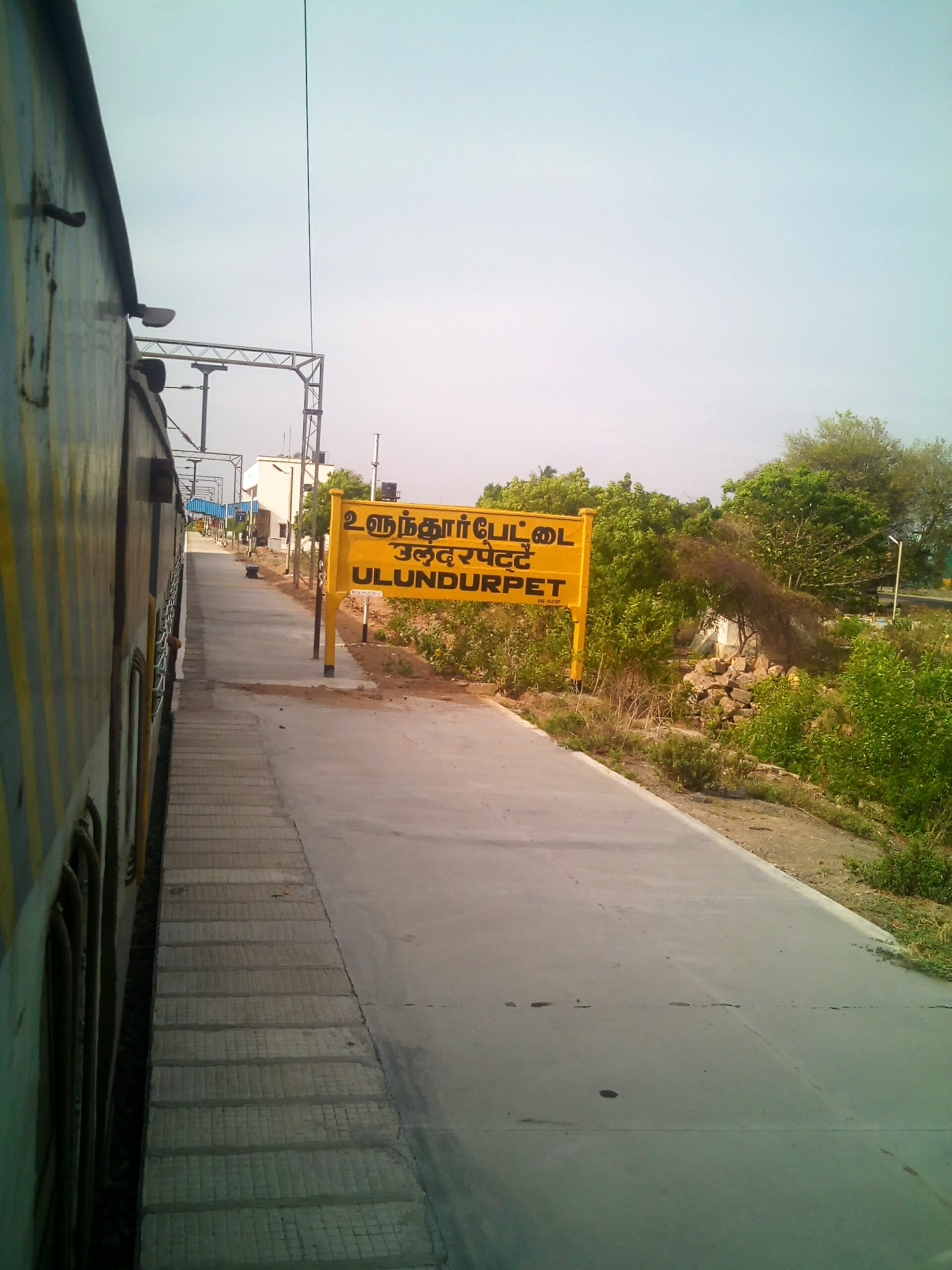 இரயிலில் இருந்தபடியே எடுக்கப்பட்ட, உளுந்தூர்பேட்டை இரயில் நிலையப் புகைப்படம்.